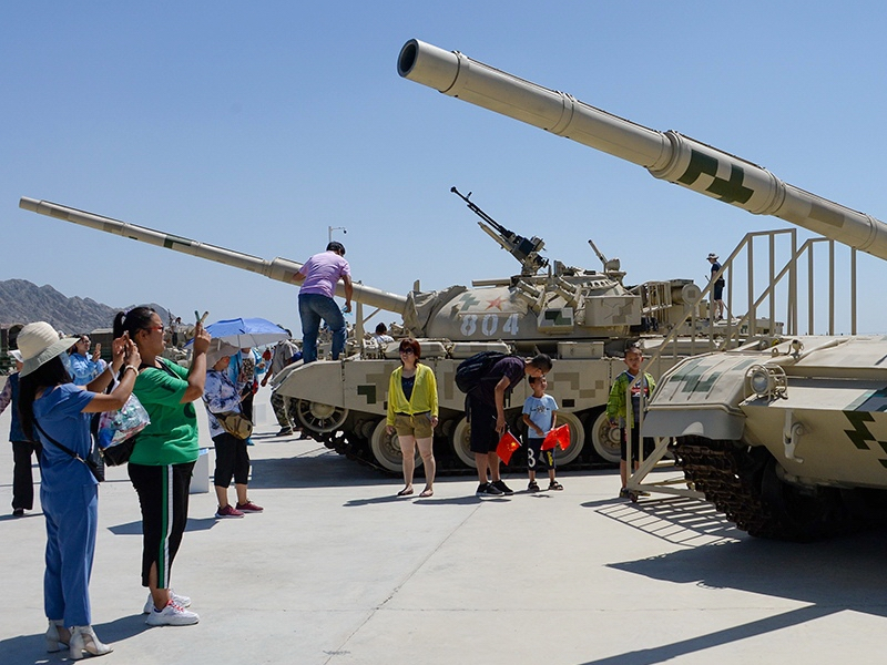 中国陆军装备的88A型坦克